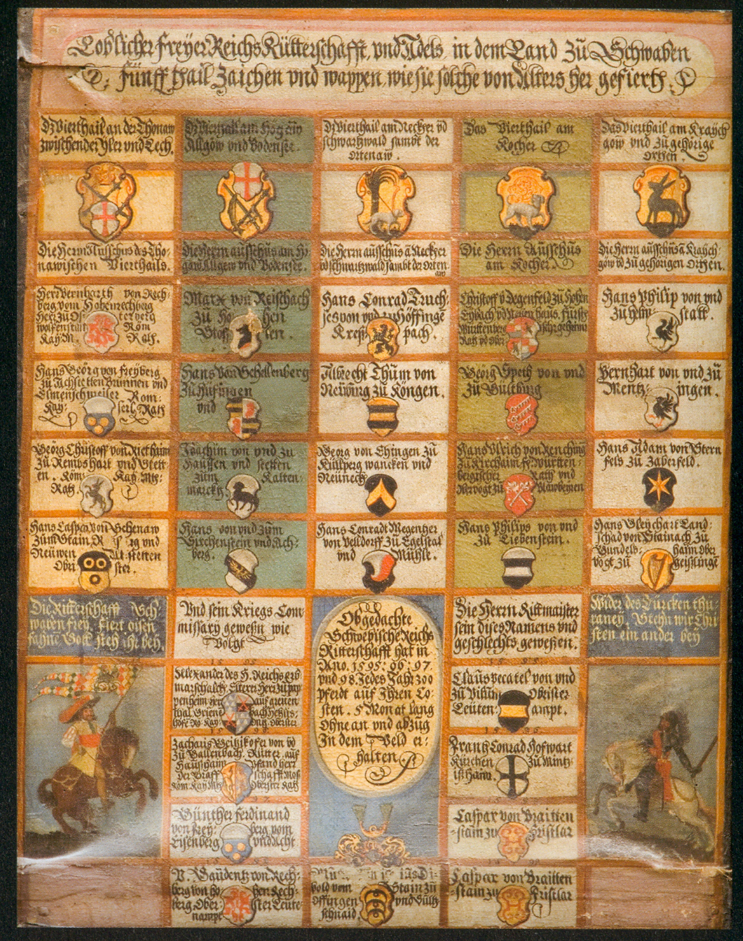 Wappentafel der Reichsritterschaft in Schwaben Oben die fünf Viertel: "Iller undLech"; "Hegau, Allgäu und Bodensee"; "Neckar und Schwarzwald, und Ortenau"; "am Kocher"; "Kraichgau" symbolisiert sind diese durch die Embleme der alten Adelsgesellschaften Darunter die Namen der Ausschussmitglieder